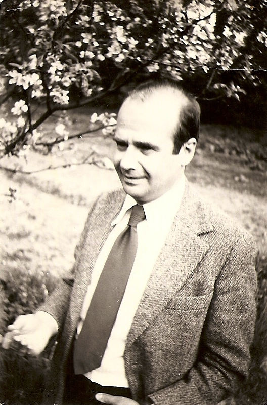 Andrzej Kijowski ur.1928 - zm. 1985, Dom Aktora w Skolimowie